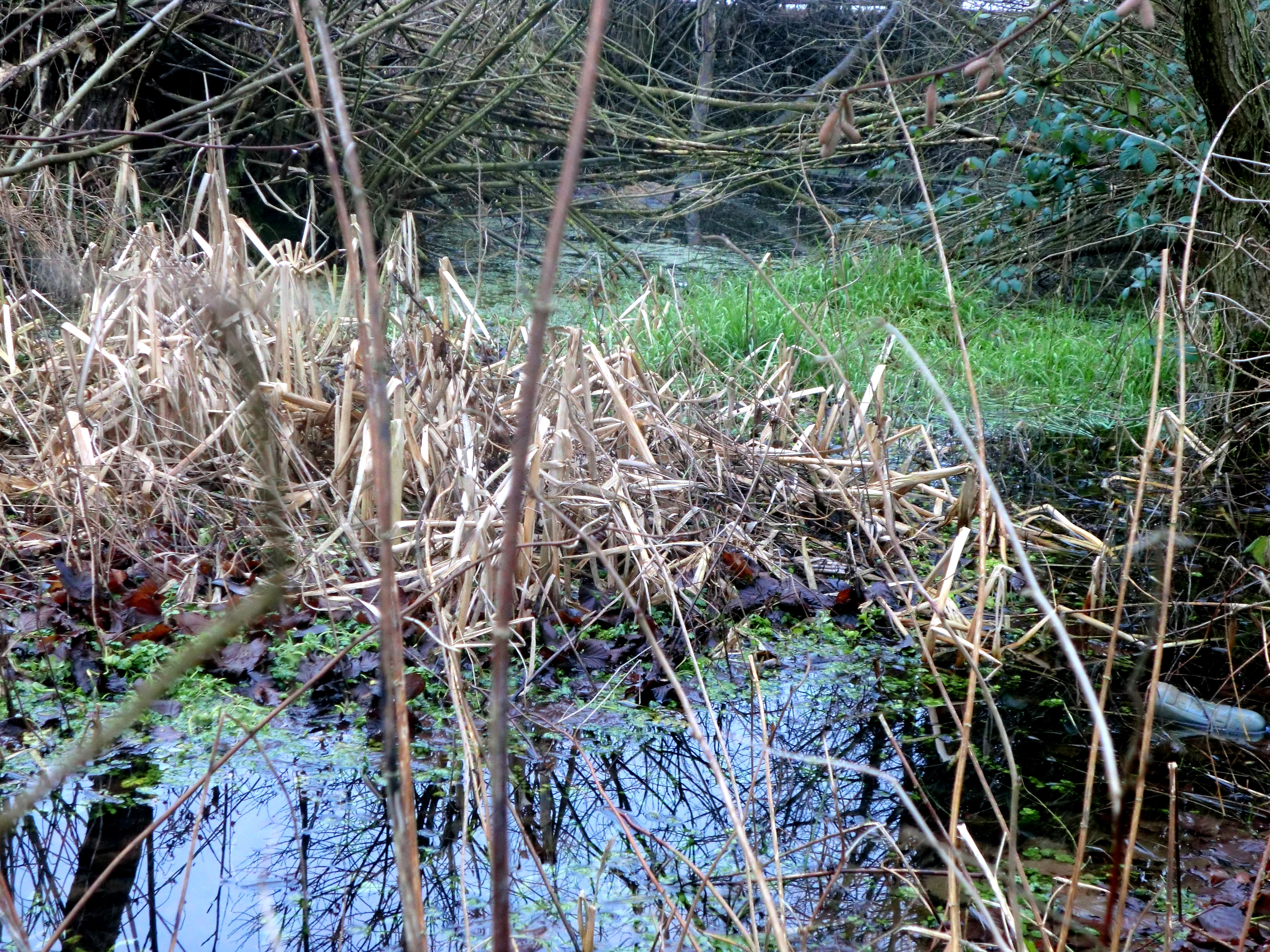 Wasserfläche im südlichen Bereich des Feuerlöschteiches Balkenkamp